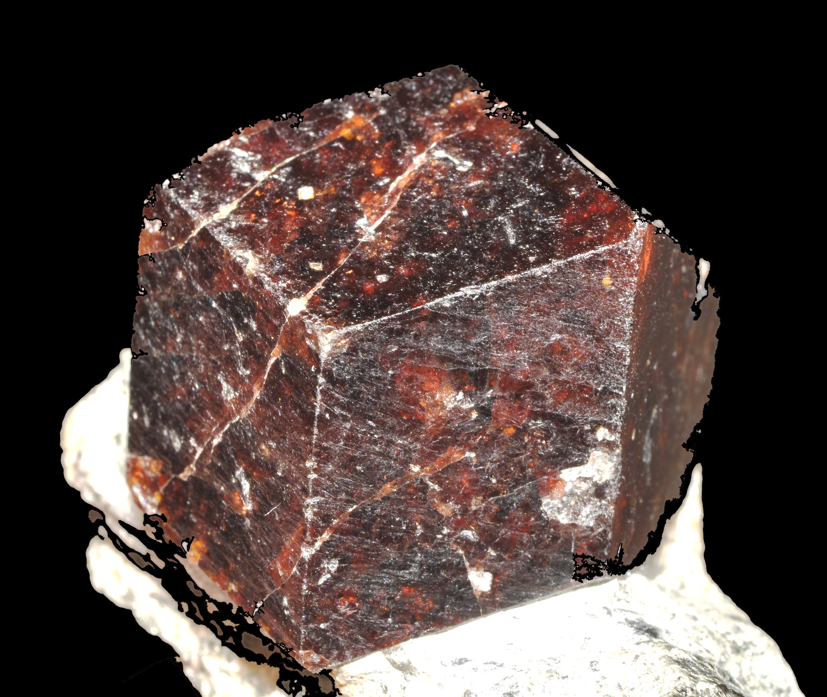 Cristal de grenat var. pyrope